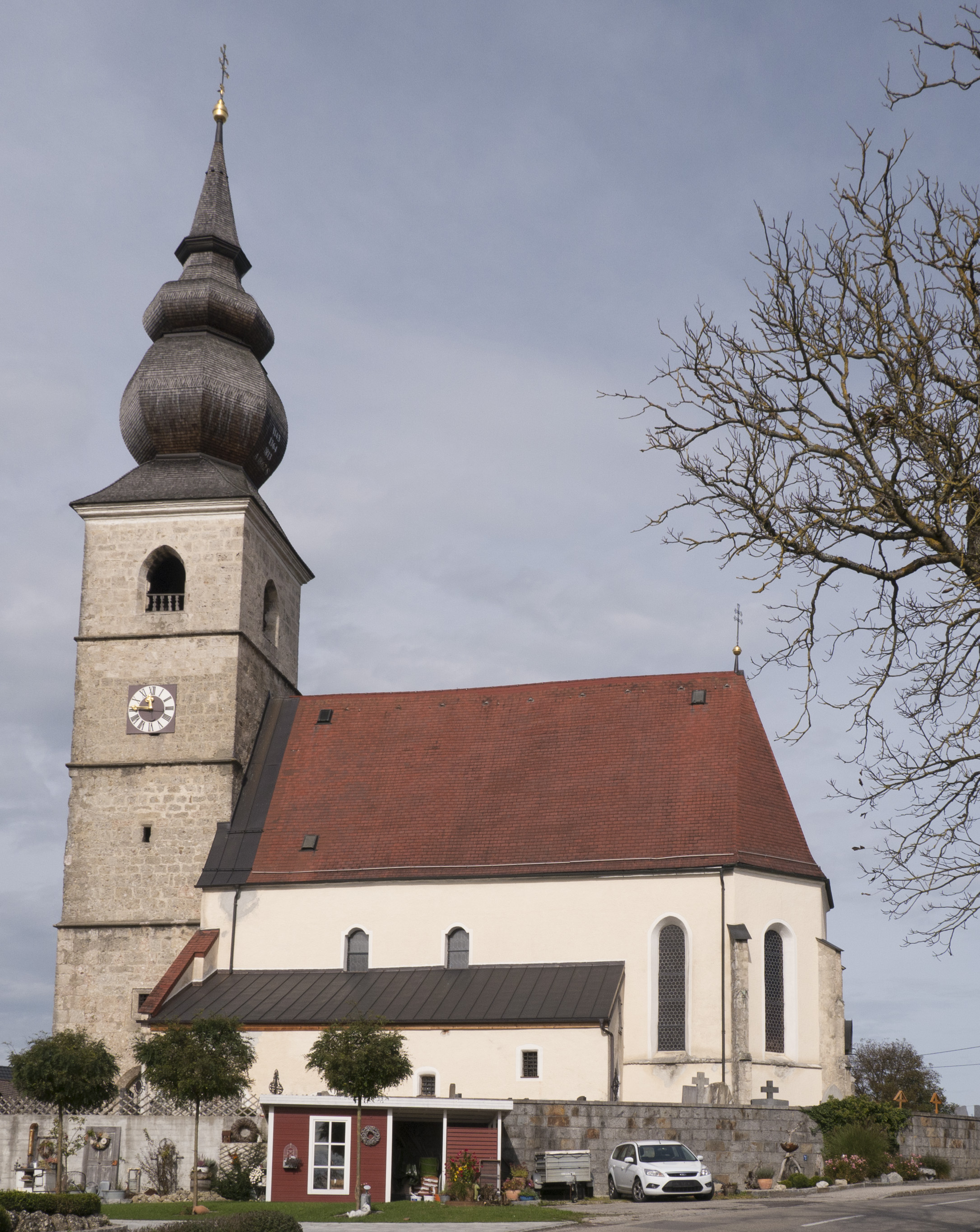 Kath. Pfarrkirche hl. Kunigunde und Friedhof